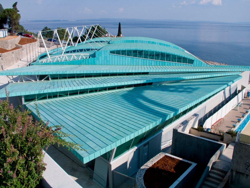 Novi bazen na Kantridi, Rijeka